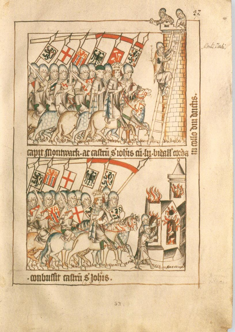 Codex Balduini Trevirensis: Kaiser Heinrichs Romfahrt, Der blutige Italienzug Kaiser Heinrichs VII. (Miniatur mit kaiserlichem Strafgericht) 1312/1313, um 1340, Landeshauptarchiv Koblenz, Best. 1 C Nr. 1 fol. 27